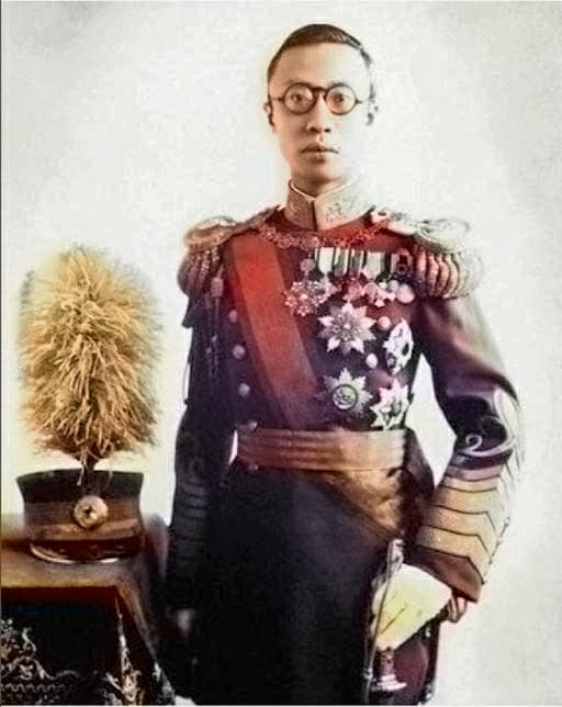 Puyi-Manchukuo colorized